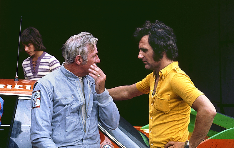 Brian Muir und Toine Hezemans im Fahrerlager des Nürburgrings